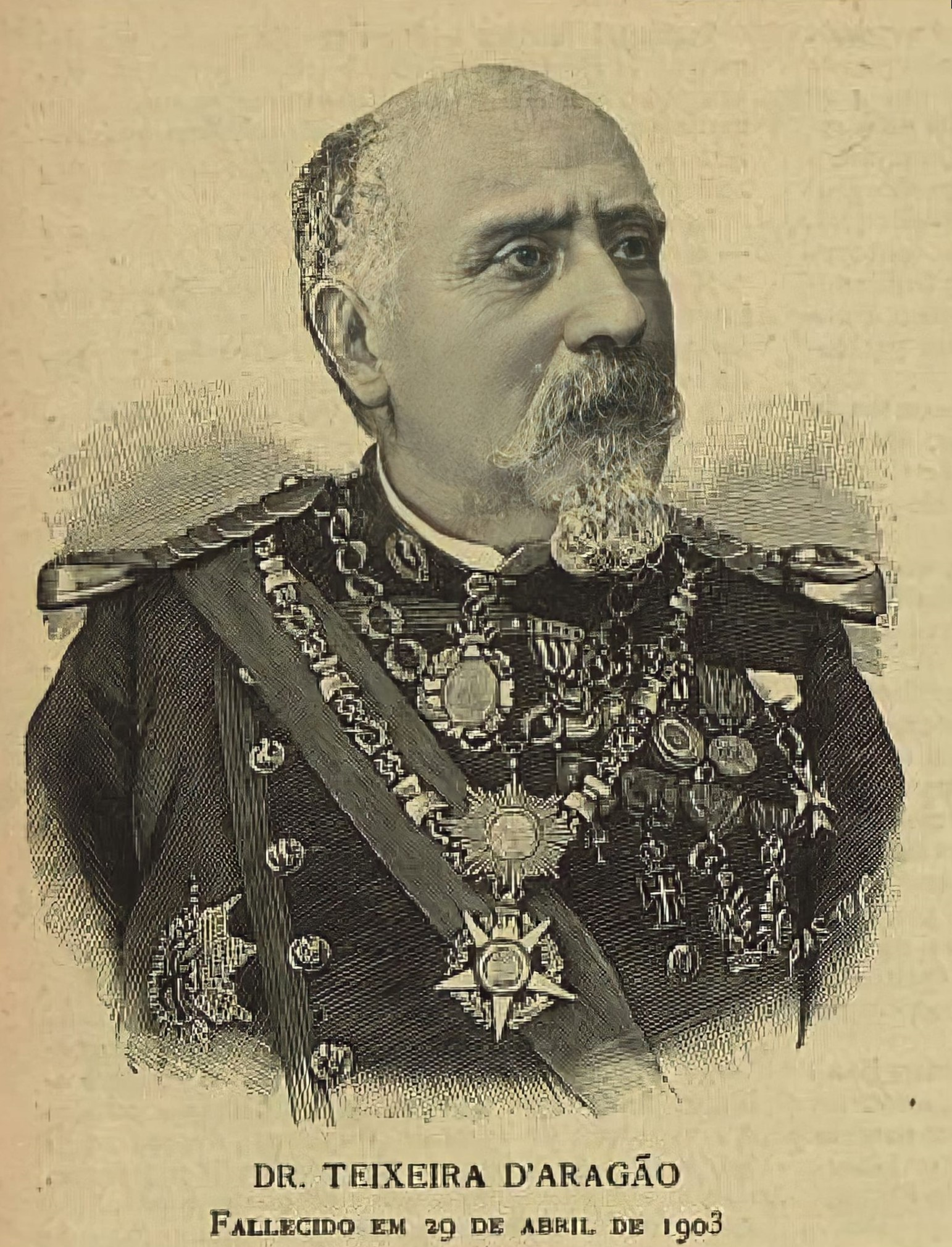 Teixeira de Aragão